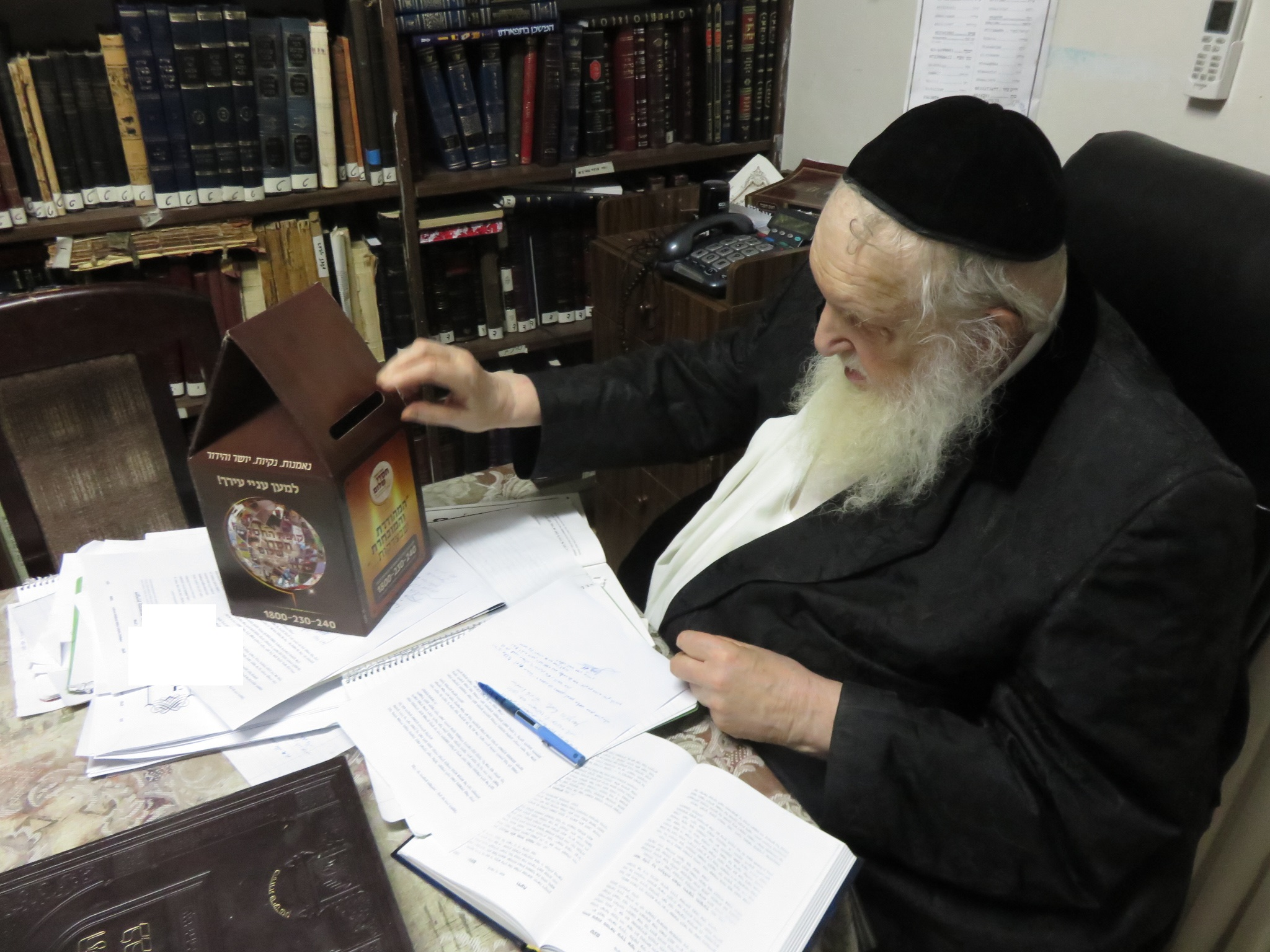 תורם לקופת חסדי שלום